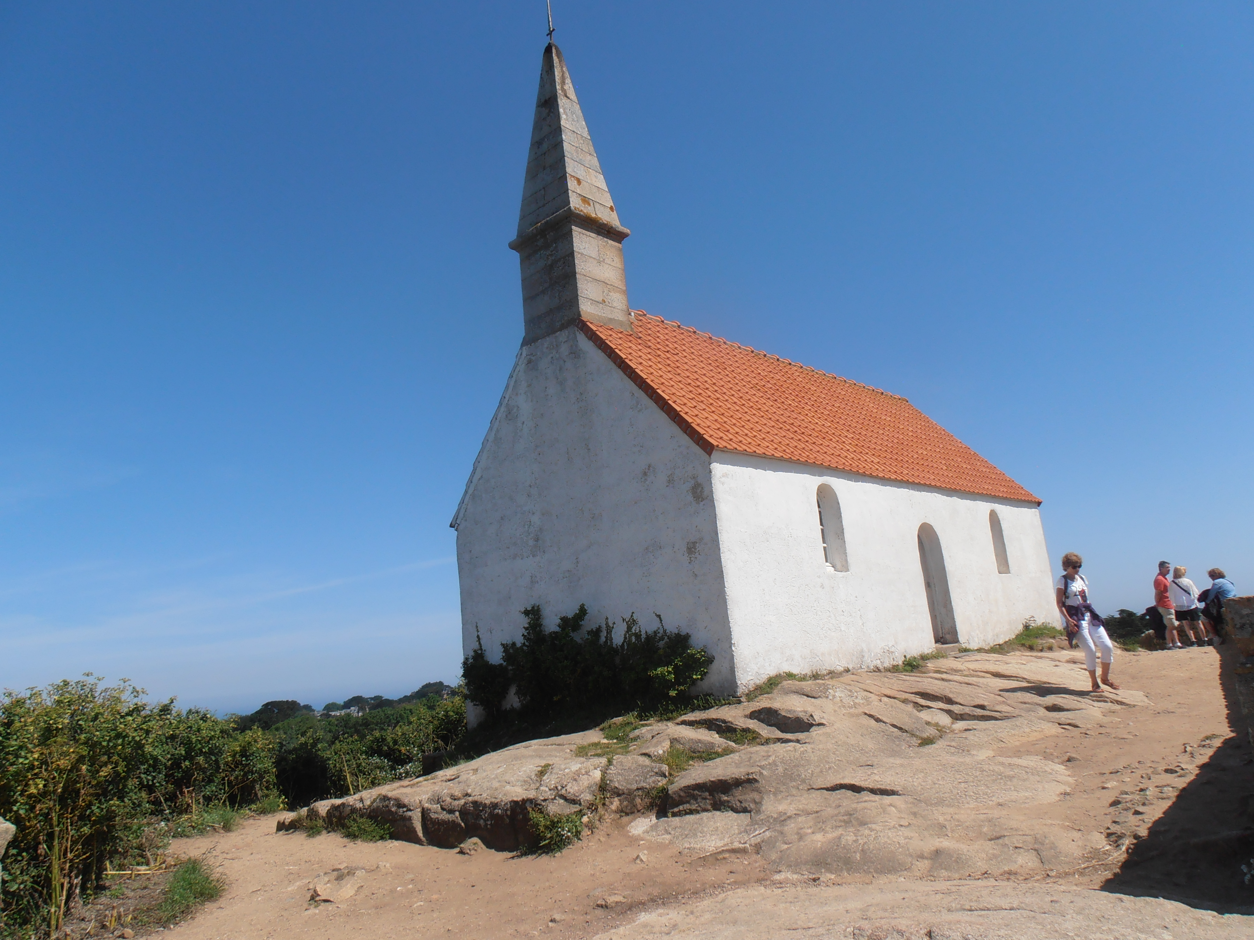 Côtes d'Armor, Île-de-Bréhat, Chapelle Saint-Michel